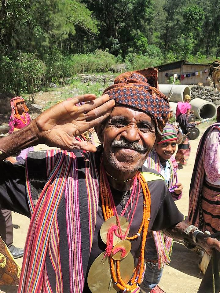 Procissao no Suco de Aituto, Posto de Maubisse